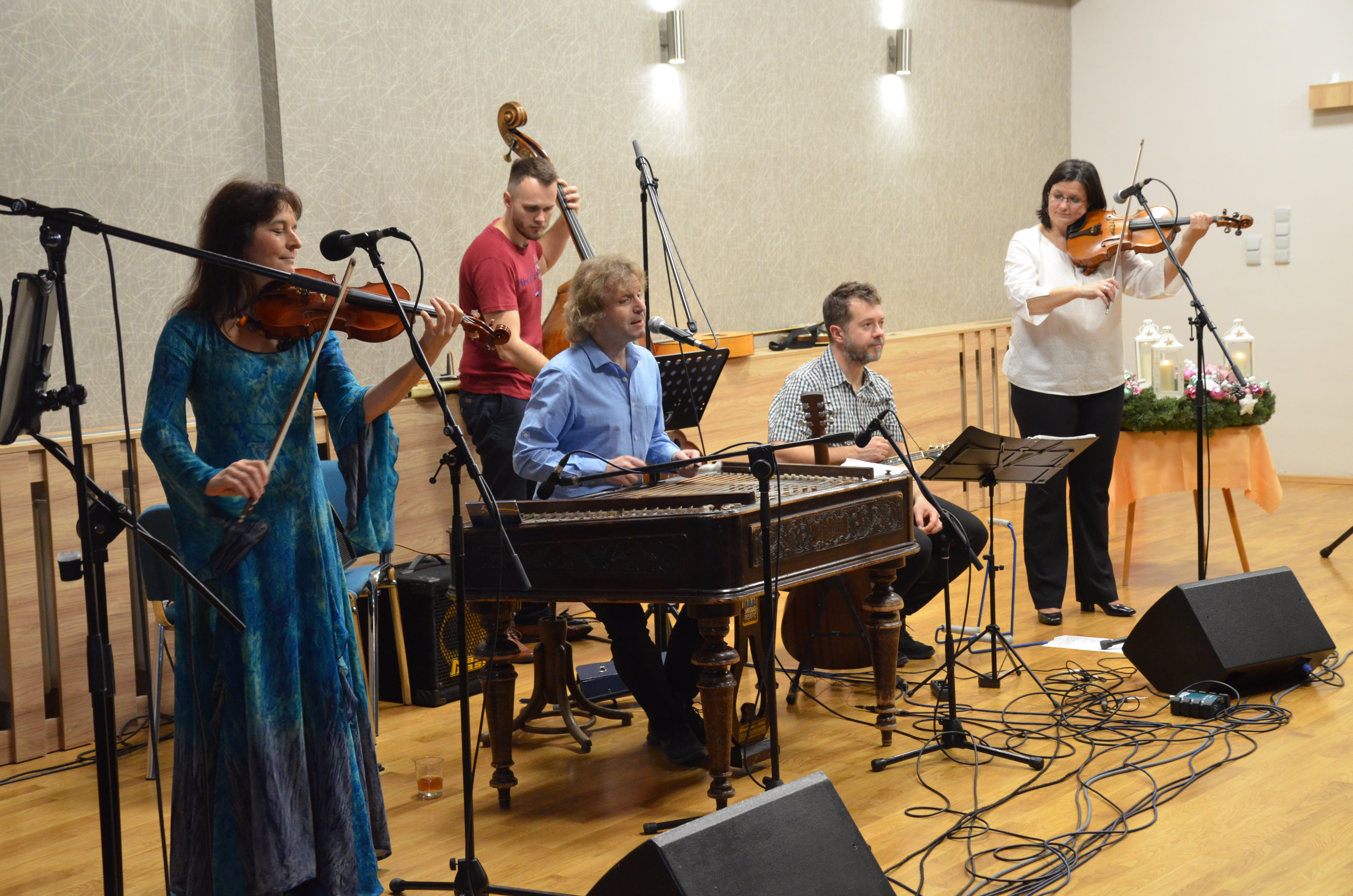 Koncert brněnské skupiny Cimbal classic v Adamově